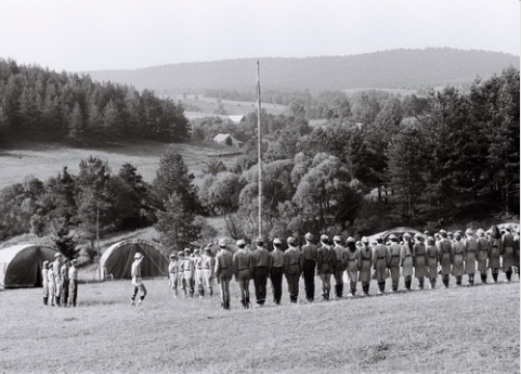 Obóz podczas operacji Bieszczady 40